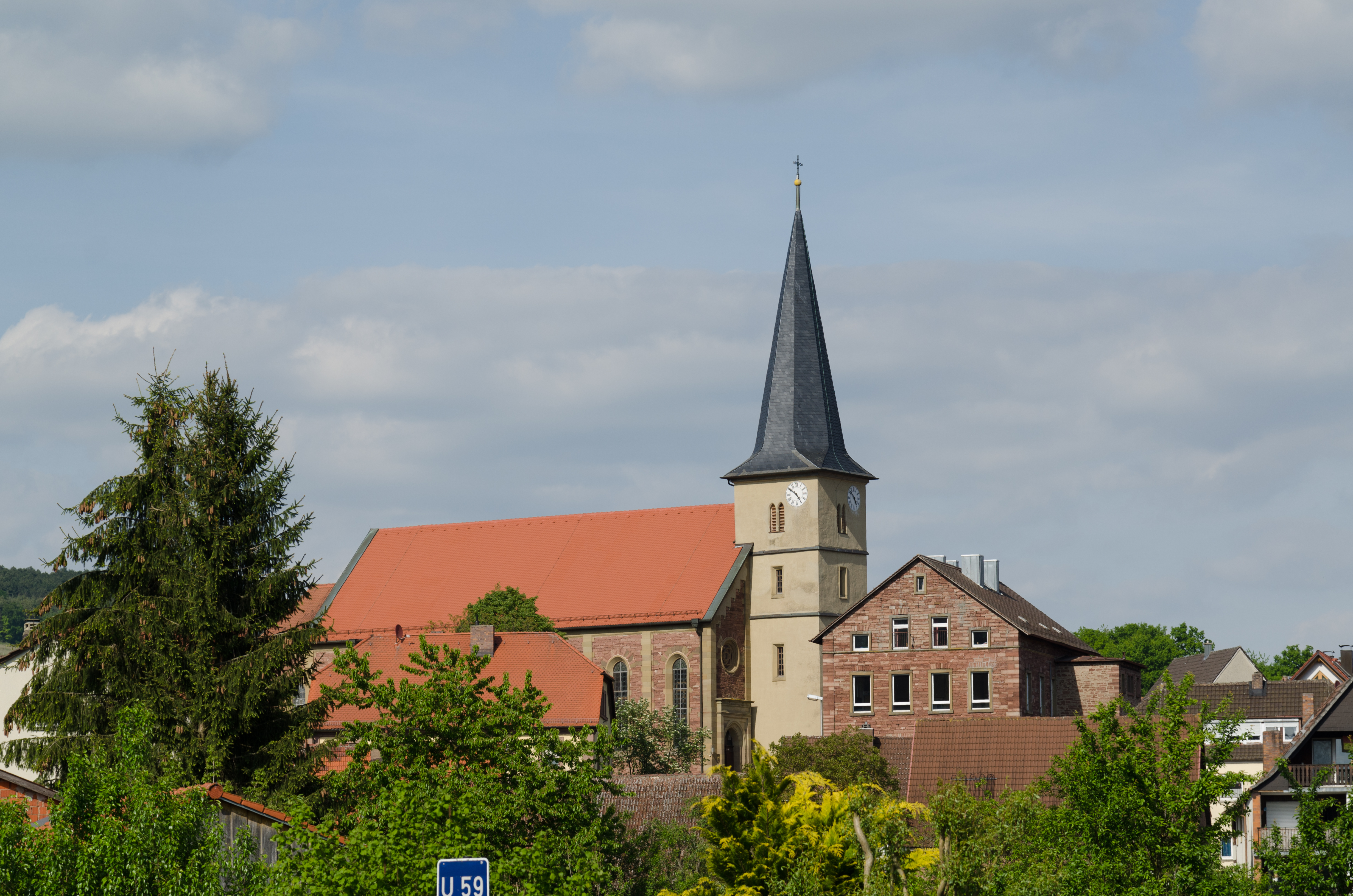 Katholische Pfarrkirche St. Maria in Elfershausen